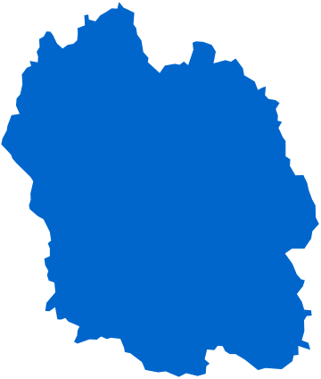 Résultats des élections législatives de la Lozère en 2012